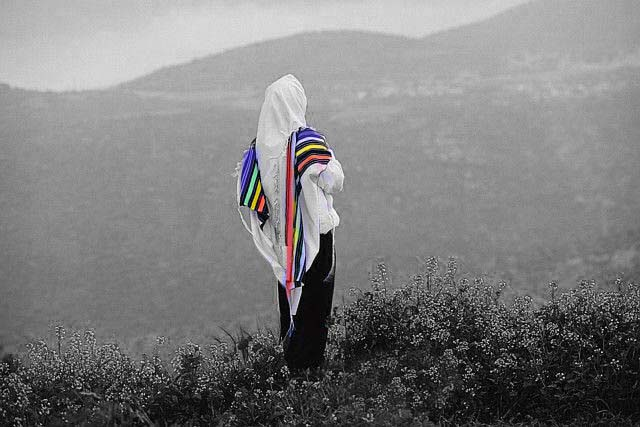 הרב רון יוסף עוטה טלית